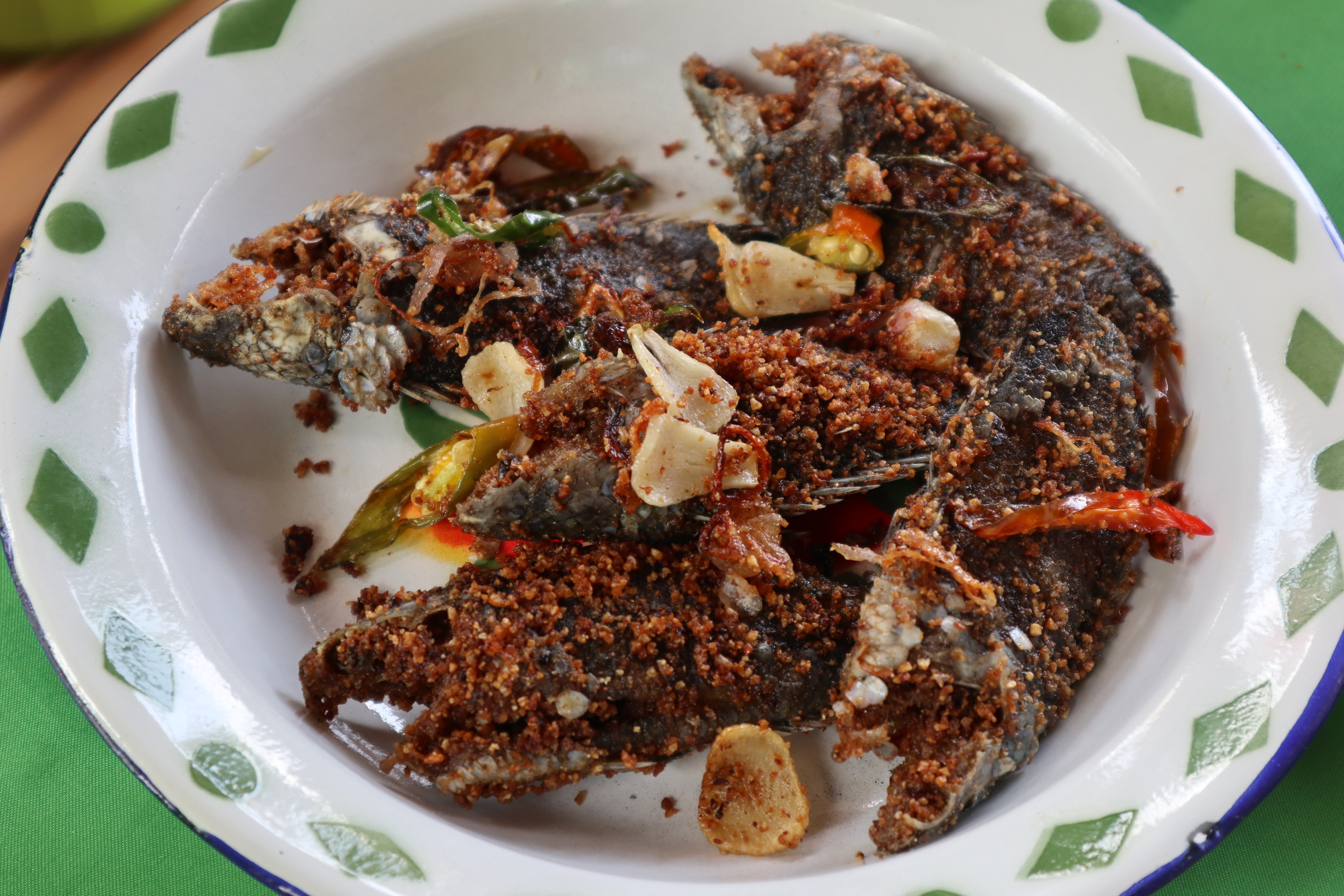 Iwak pakasam basanga (bahasa Indonesia: Ikan pekasam goreng) adalah masakan Banjar rumahan yang terbuat dari ikan air tawar yang difermentasi lalu ikan dibaluri beras yang telah disangrai untuk kemudian digoreng.